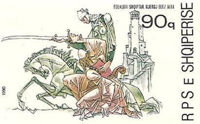 Сцена из историй о богатыре Алии Джерзелезе.